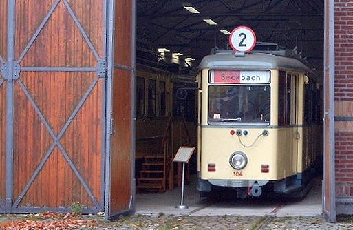 Historic Streetcar in Tramway Museum Frankfurt am Main-Schwanheim, Germany, November 2, 2003. Photo by myself, GNU-FDL. Straßenbahn der Linie 2 mit Ziel Seckbach, Schwanheimer Verkehrsmuseum, Frankfurt am Main, 2. November 2003. Selbst fotografiert, GNU-FDL.